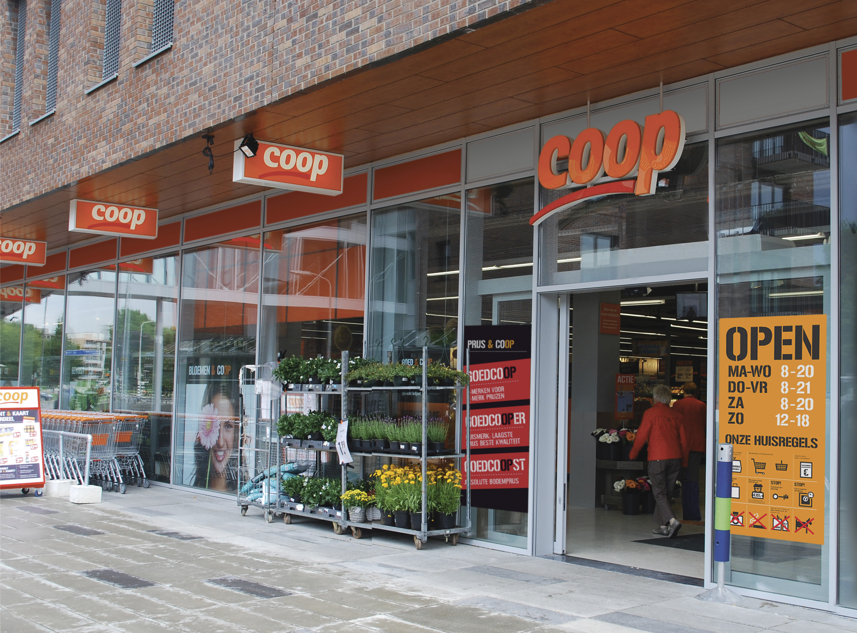 De vestiging van Coop Supermarkten in Velp (Gelderland).